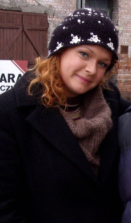 Daria Widawska (ur. 1977 w Gdańsku) - polska aktorka.